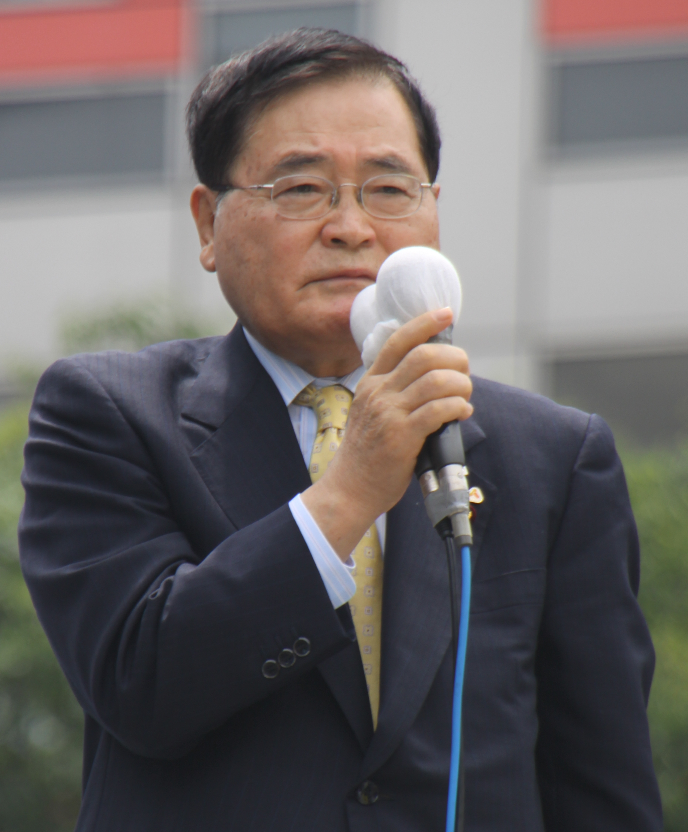 亀井静香、Shizuka Kamei